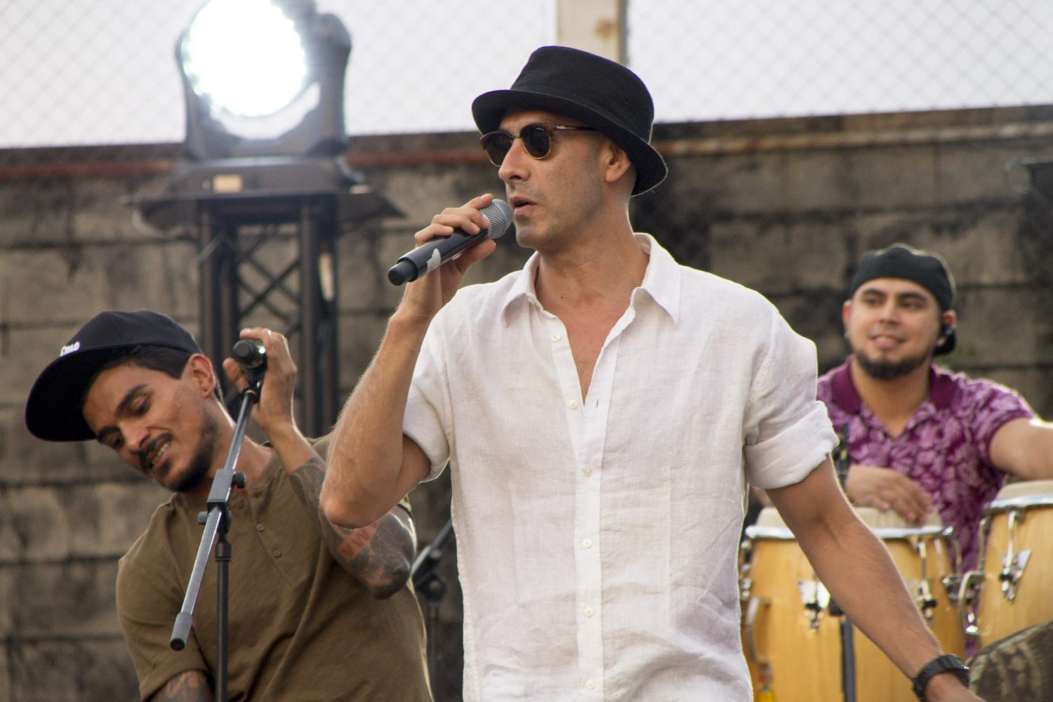 Música en directo a ritmo de salsa, ayer, en la Explanada Multiusos Madrid Río, a cargo de la famosa orquesta bogotana La-33, que animó a los presentes en una multitudinaria y animada Noche de baile.